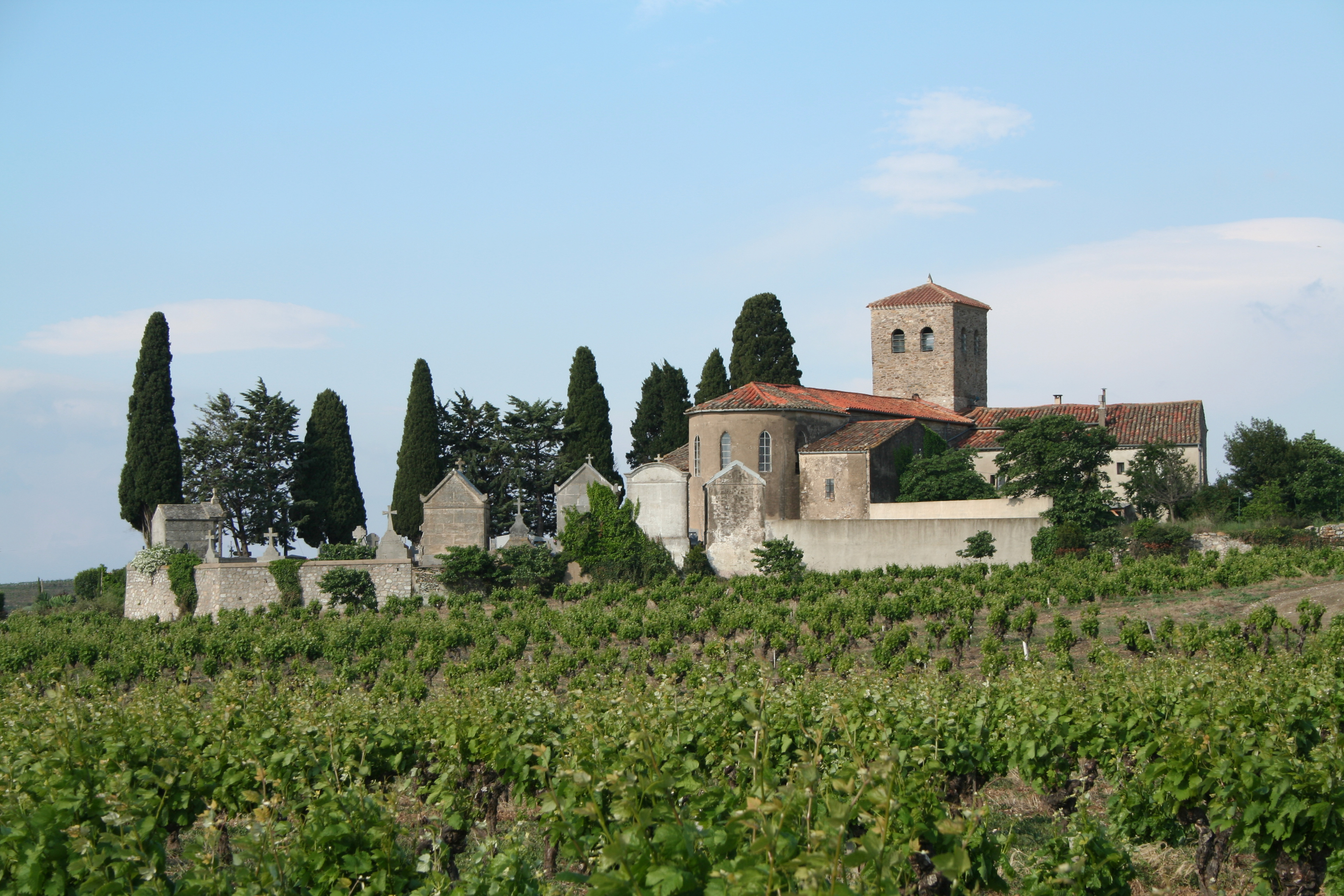 Caussiniojouls (Hérault) - église Saint-Étienne.